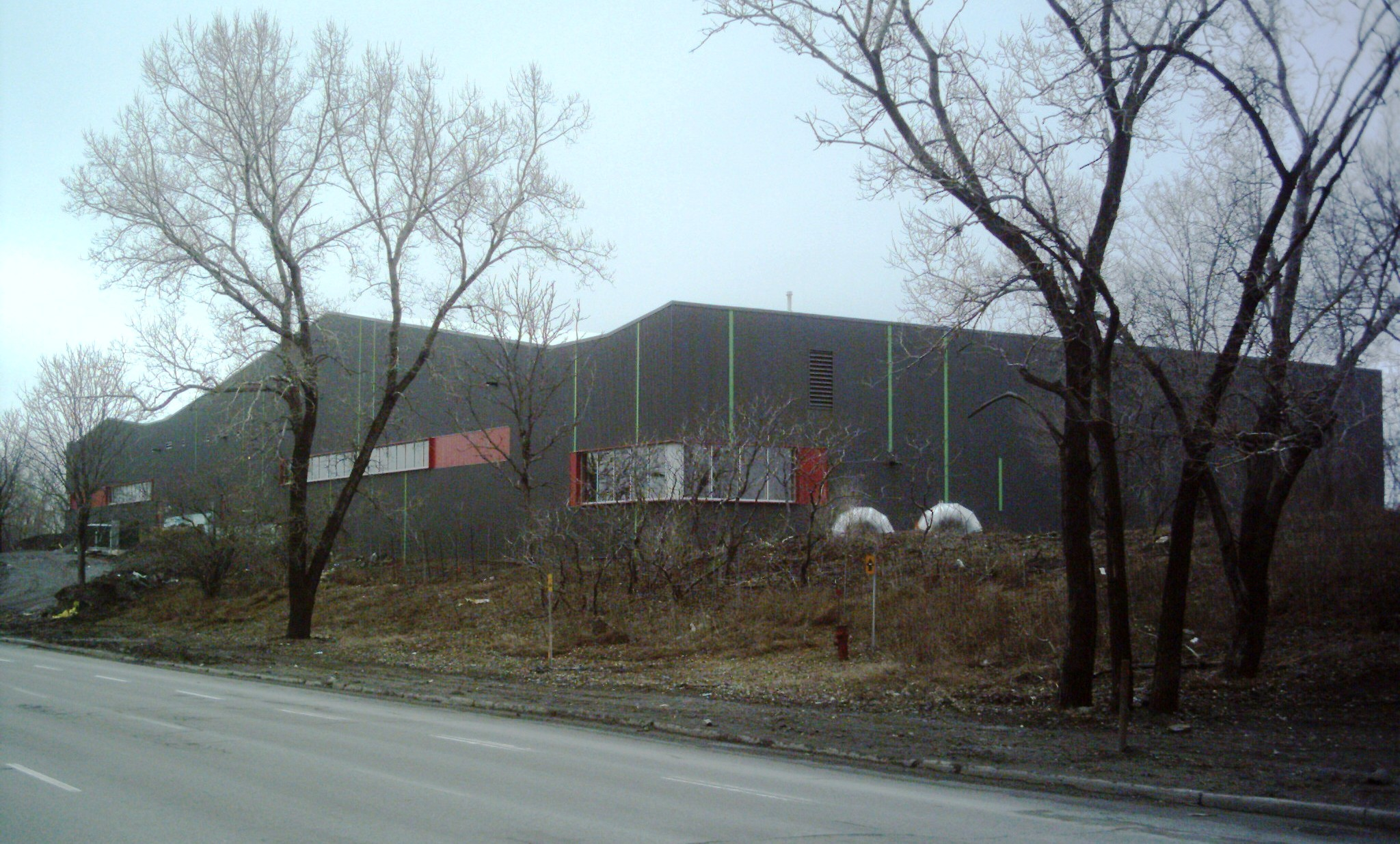 Le Taz, situé à Montréal, est l'un des des plus grands centres sportifs intérieurs au Canada. Il est consacré à la pratique du skateboard, du BMX, et du patin à roues alignées.